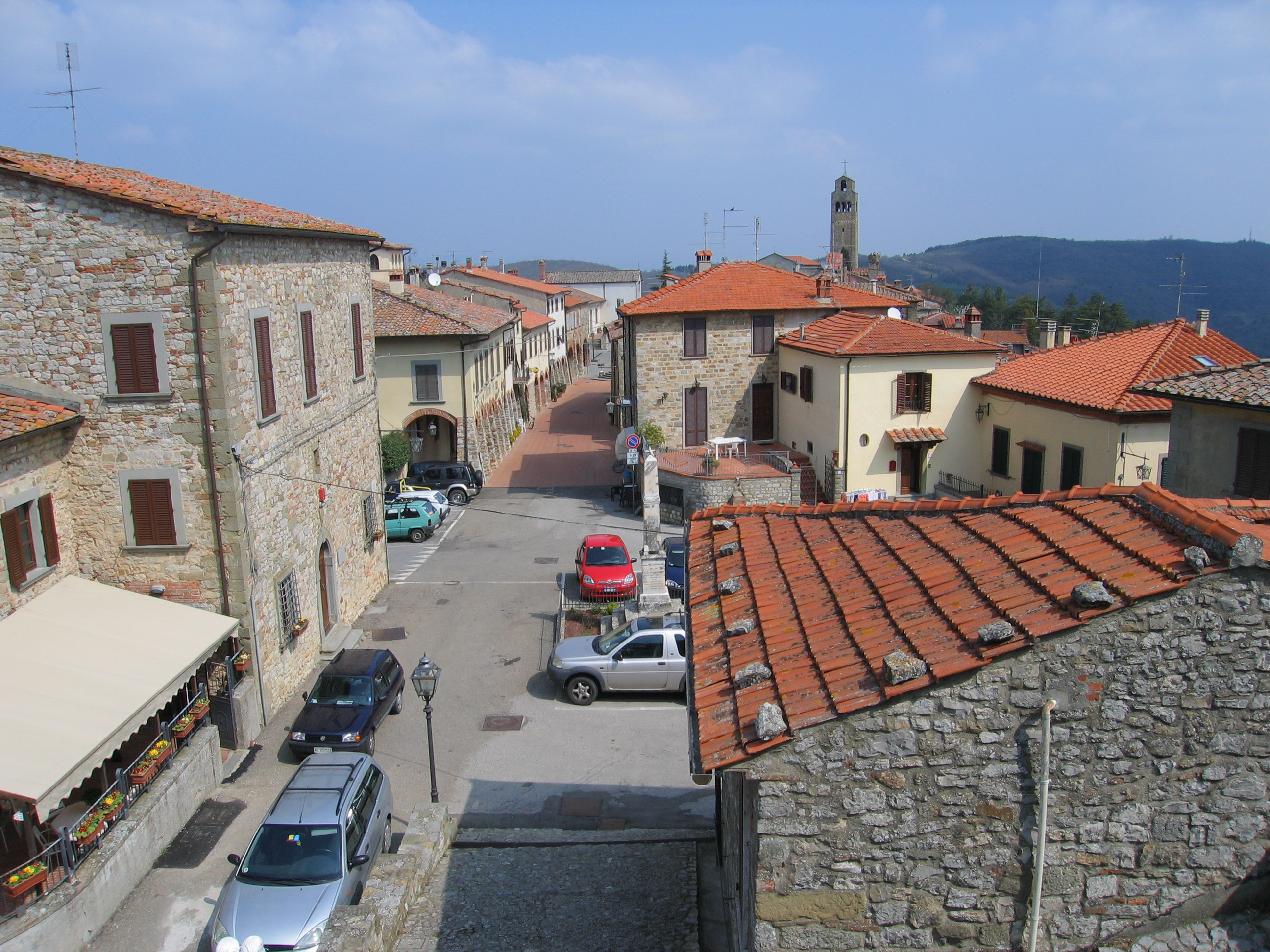 Civitella di Val di Chiana taken from the castle.